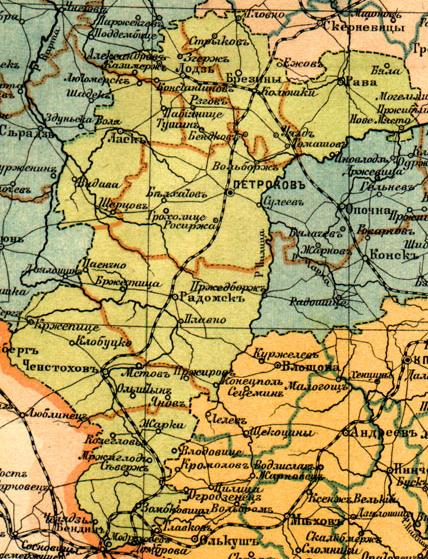 Петроковская губерния в 1896 году